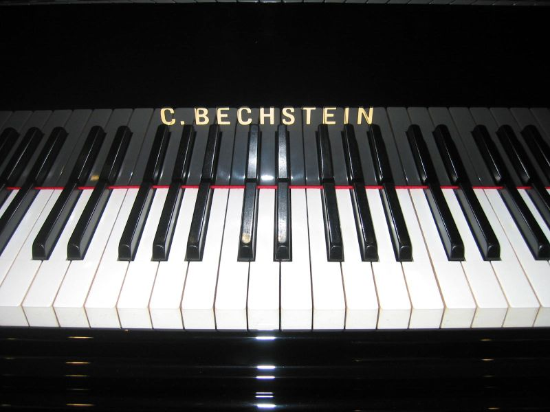 Bechstein Firmenschriftzug